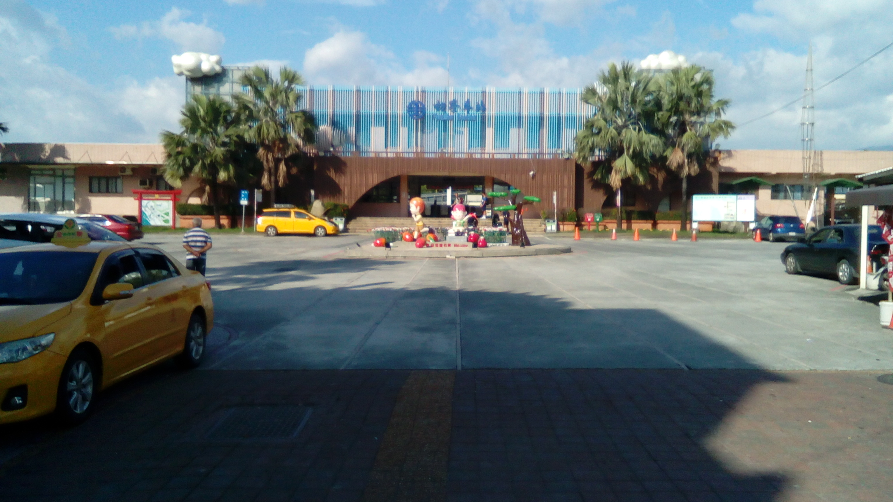 台鐵枋寮站